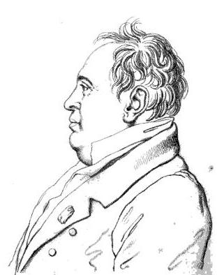 "J. A. Alavoine, architecte, né à Paris le 4 janv. 1778, mort dans la même ville le 15 nov. 1834. Dessiné d'après nature et gravé par son ancien camarade E[ustache]-Hyacinthe Langlois du Pont-de-l'Arche."